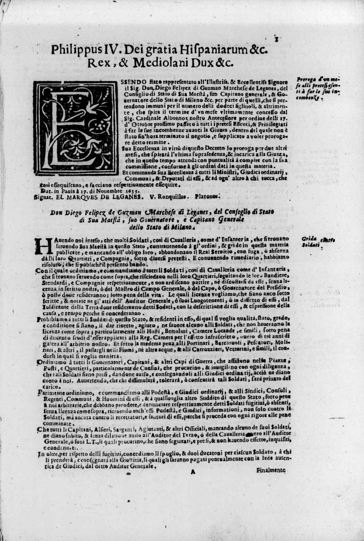 Pagina 1